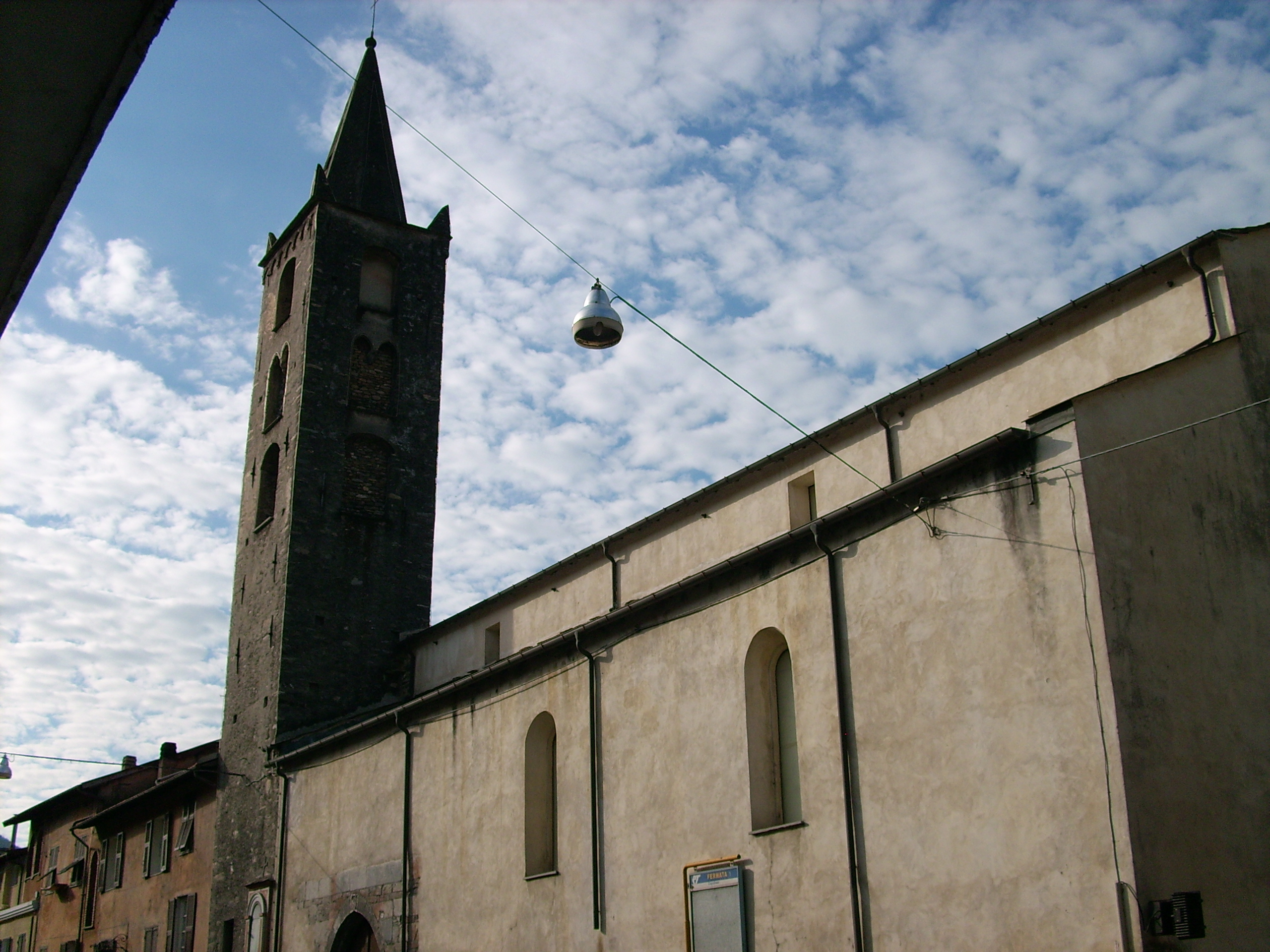 Oratorio di Pieve di Teco, Liguria, Italia